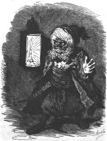 Der Räuber Hassan. Szene aus Die Errettung Fatmes